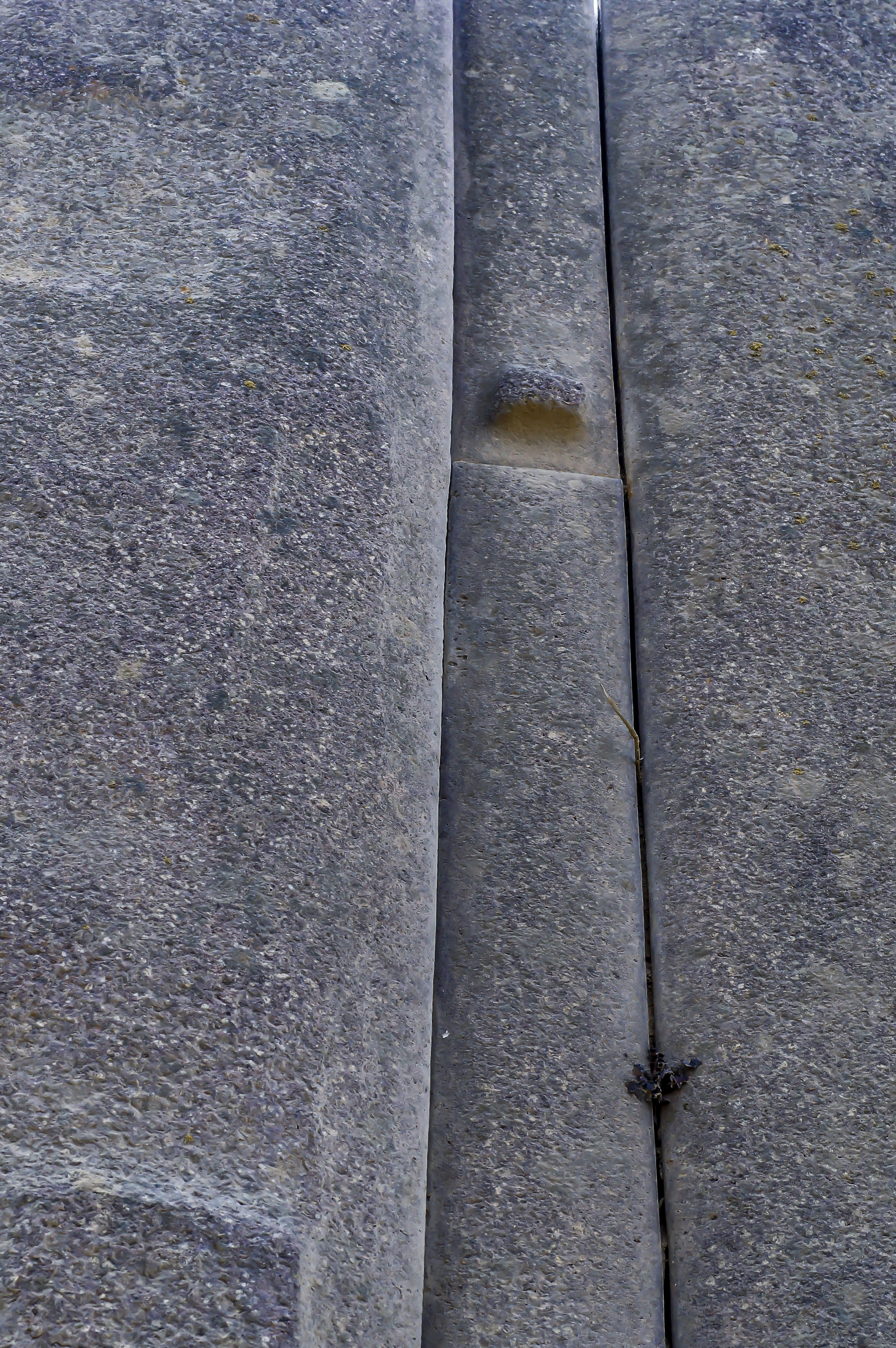 Ollantaytambo a Cusco